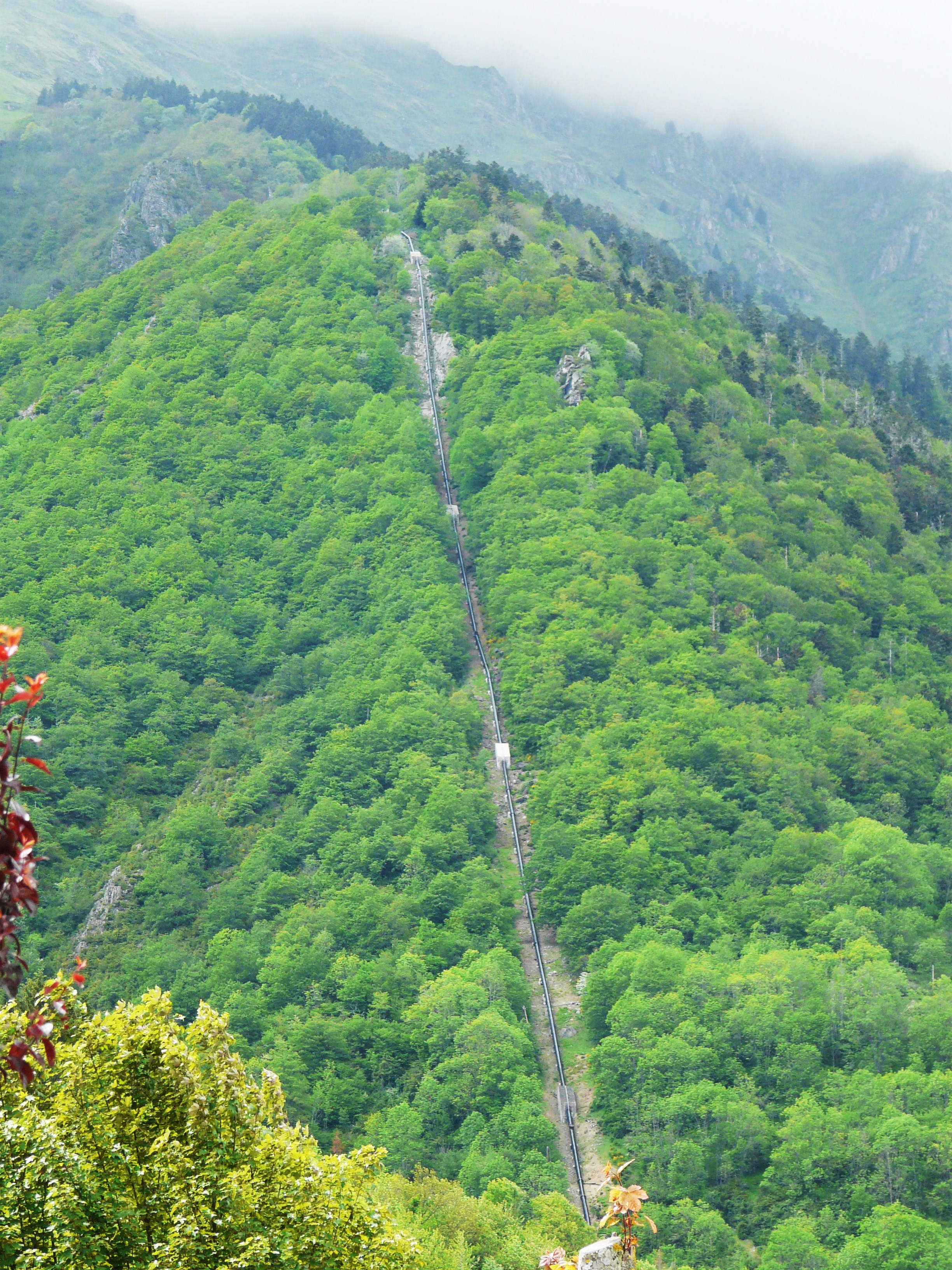 Conduite forcée à Guchen, Hautes-Pyrénées, France.